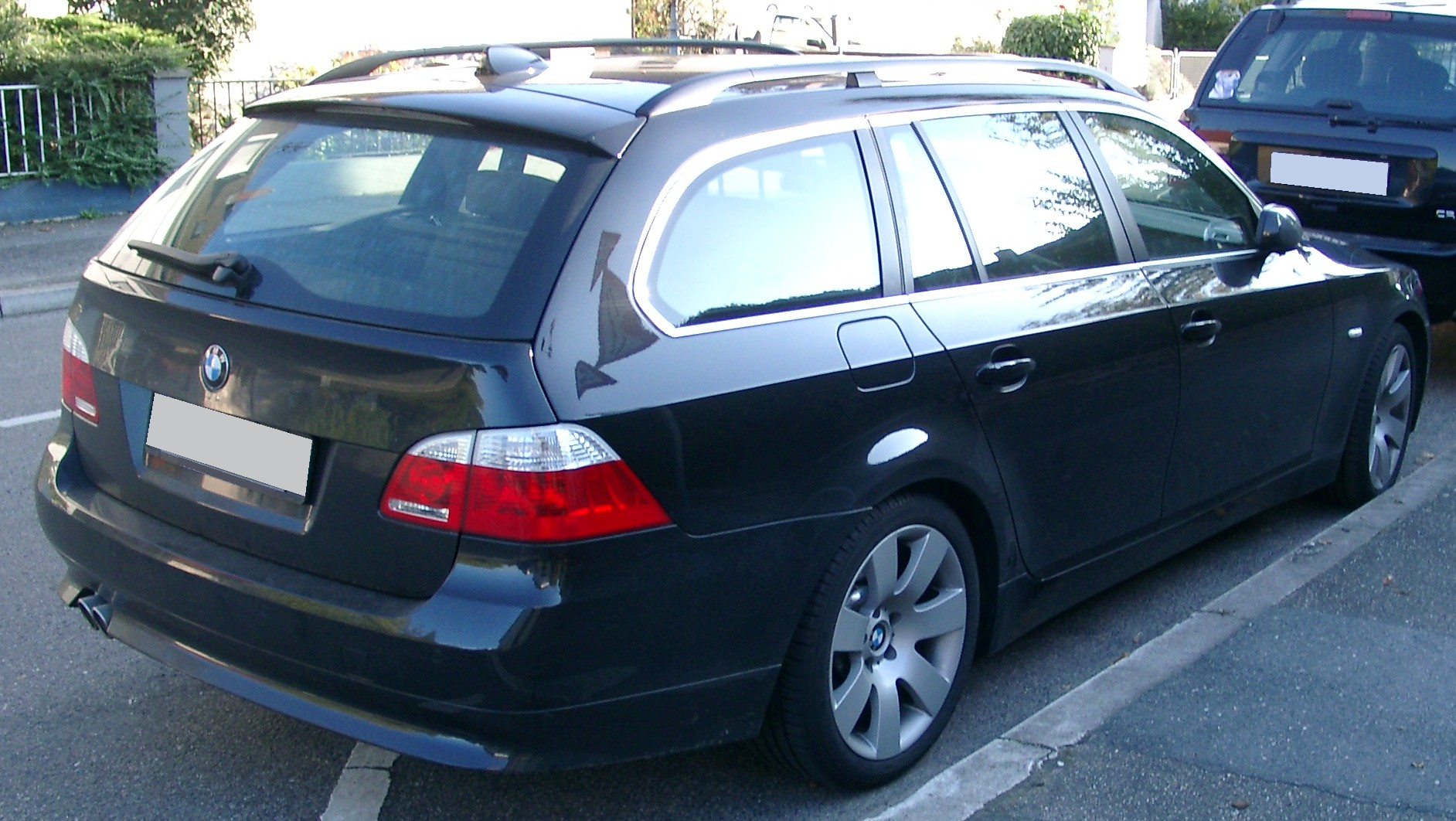 BMW E61